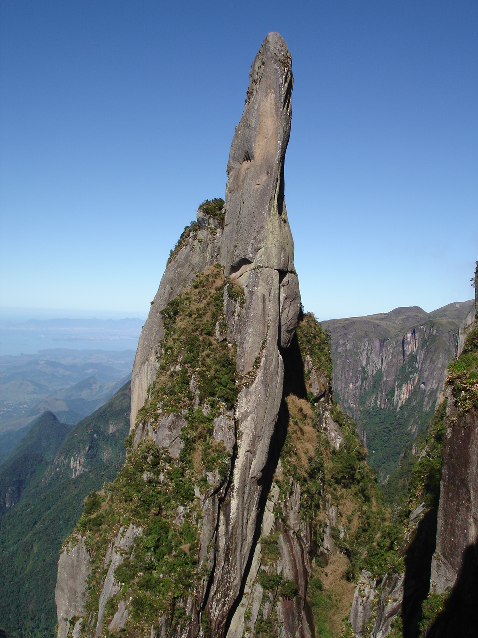 Agulha do Diabo. Parque Nacional Serra dos Orgãos - Teresópolis - RJ - BR